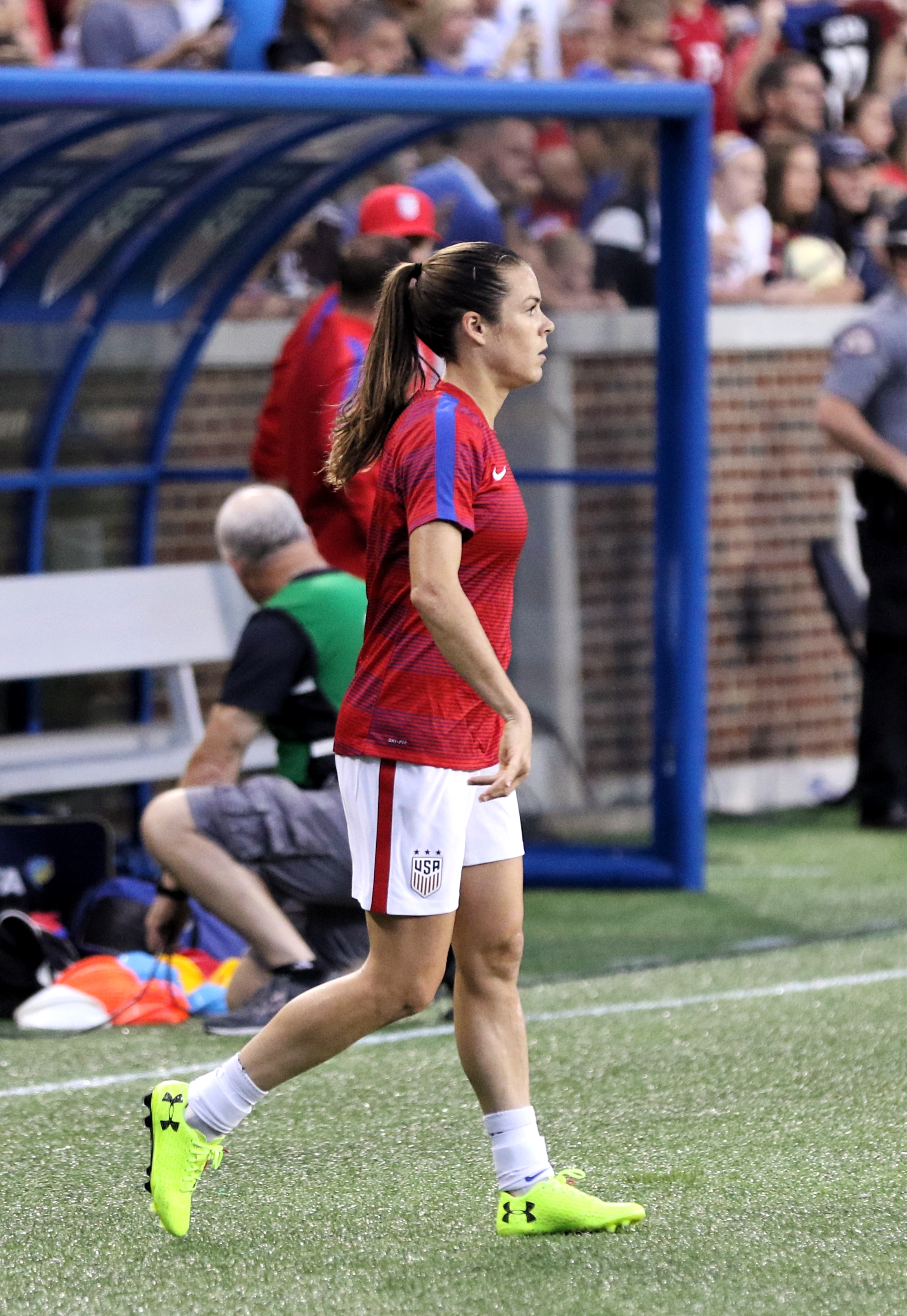 KelleyO'Hara